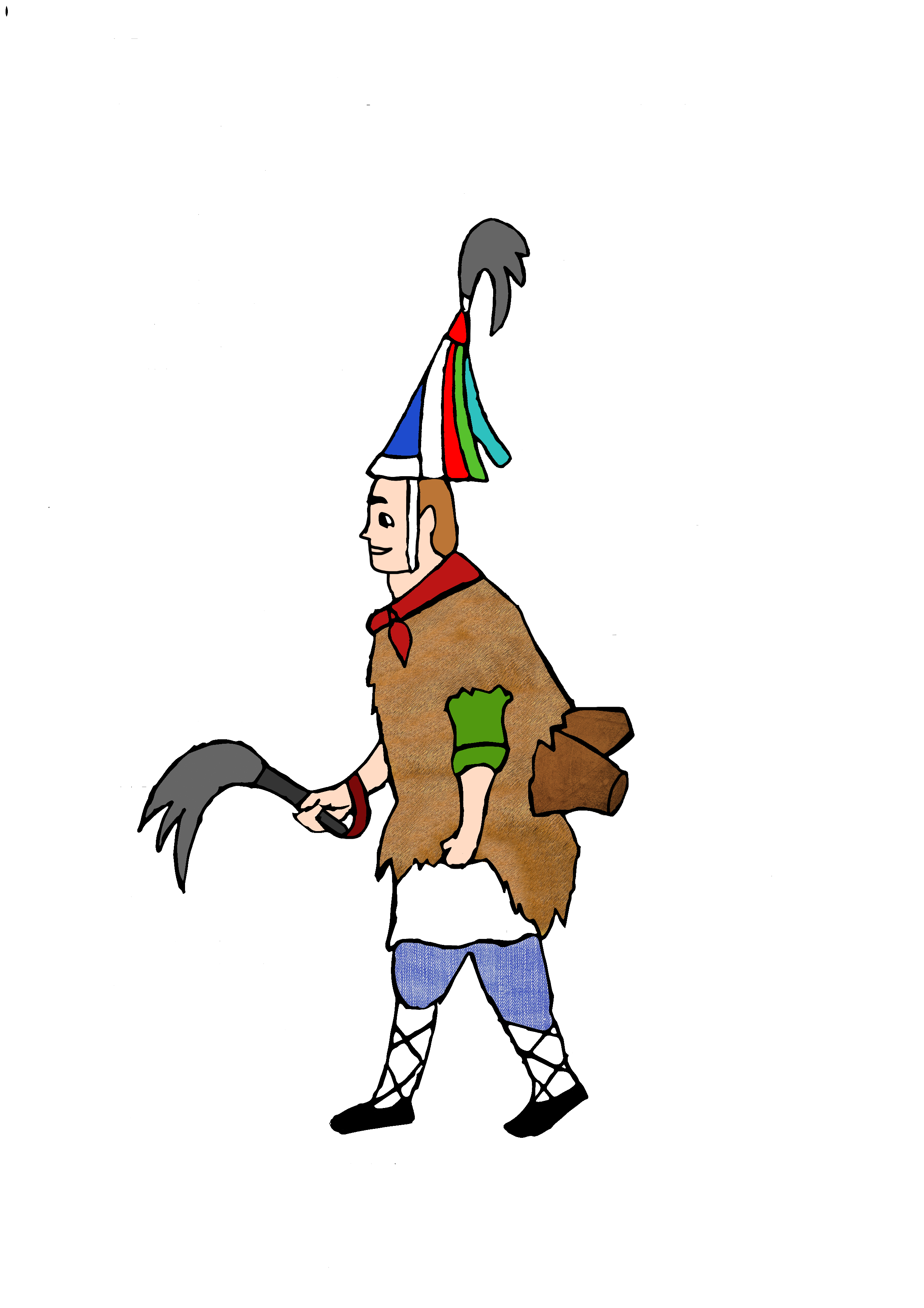 Iturengo joalduna